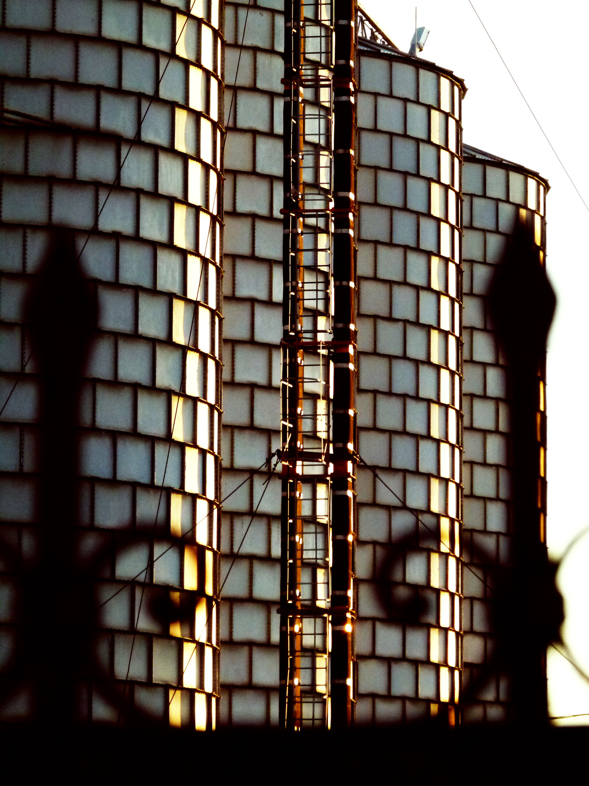 Hengermalom (Jánoshalma, Dózsa György út 141.) This is a photo of a monument in Hungary. Identifier: 2199